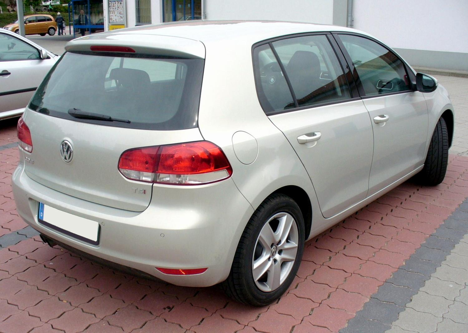 VW Golf VI